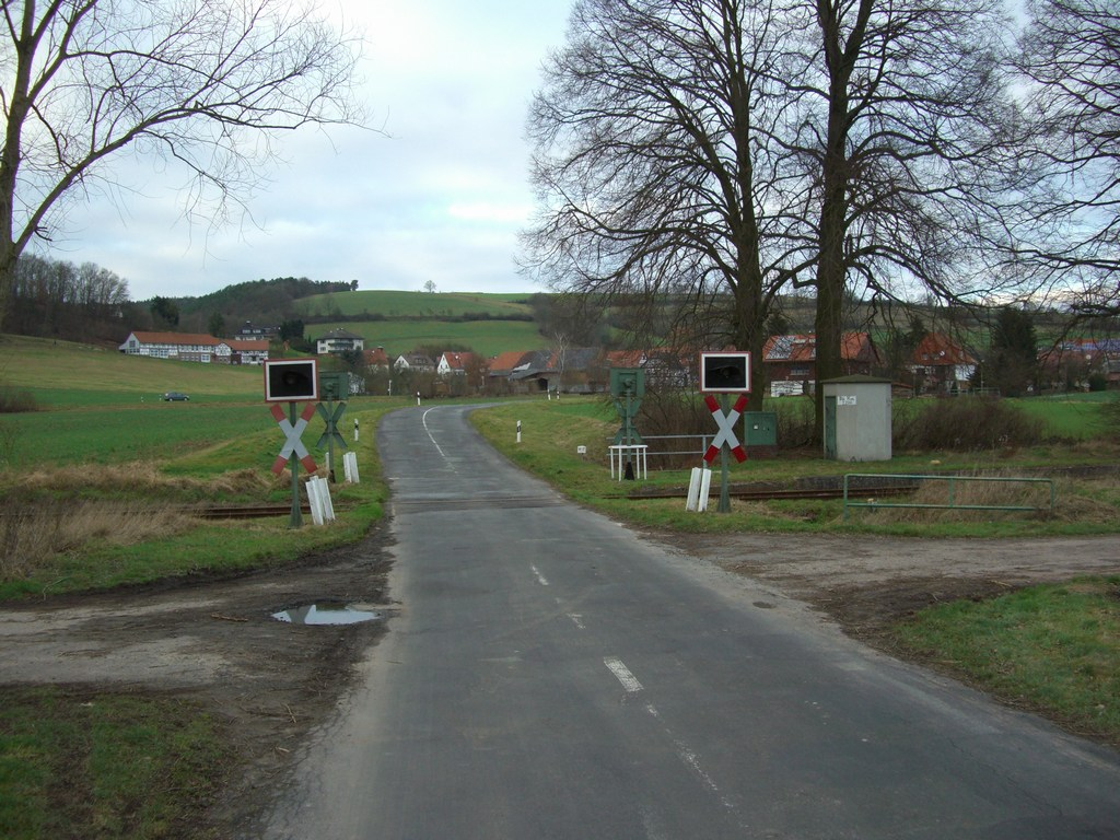 Bahnübergang Beiershausen (rechts Bahnsteigkante des ehem. Haltepunktes) (im Hintergrund Beiershausen)